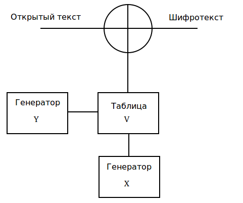 Схема работы генератора Макларена-Марсальи в поточных шифрах